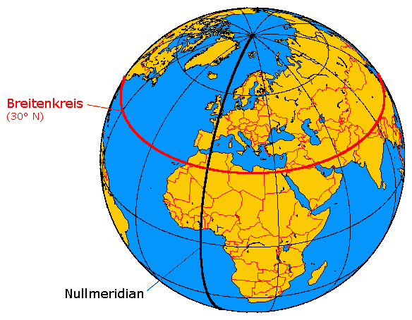 Beschreibung: Eine Grafik der Erdkugel, ein Breitenkreis (30° Nord) rot, der Nullmeridian schwarz hervorgehoben. Zeichner: Benutzer:Daniel FR Lizenzstatus: GNU-FDL Quelle: Unter Verwendung einer Vorlage von der französischen Wikipedia ( selbst angefertigt. 23. Januar 2005 Erstveröffentlichung: In dieser Form: Hier! Korrektur nach Hinweis auf einen Fehler (der Meridian endete nicht am Nordpol) am 7. Oktober 2005. Man lernt nie aus!